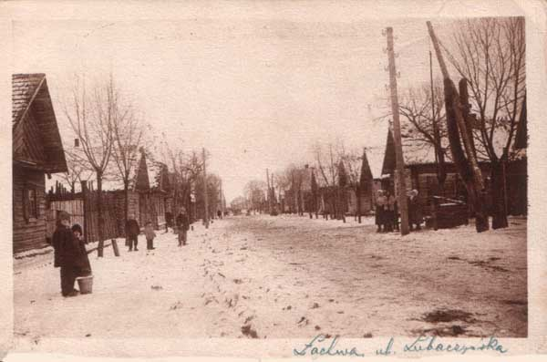 Lakhva in 1926 (then Łachwa, Poland), ulica Lubaczyńska (Lubaczynska Street)